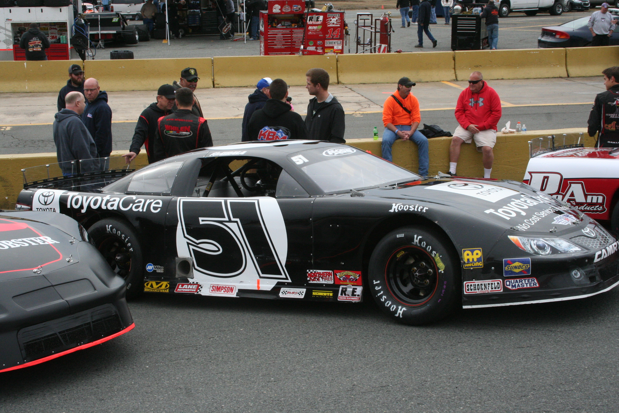 Kaz Grala